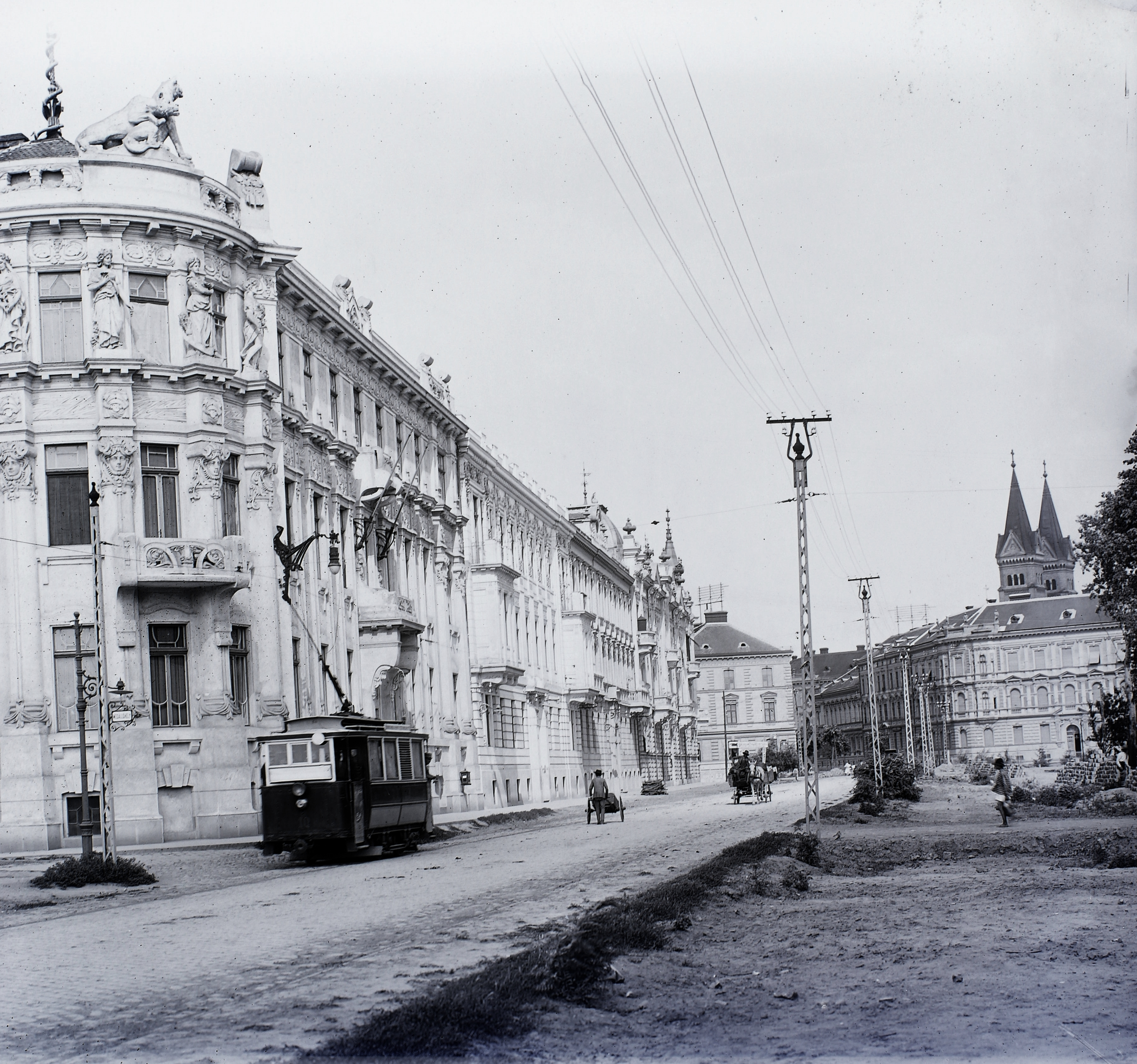 Hunyadi út (most Bulevardul 3 August 1919), jobbra a háttérben a Millenniumi templom tornyai. Location: Romania, Transylvania, Timisoara Title: Hunyadi út (most Bulevardul 3 August 1919), jobbra a háttérben a Millenniumi templom tornyai.